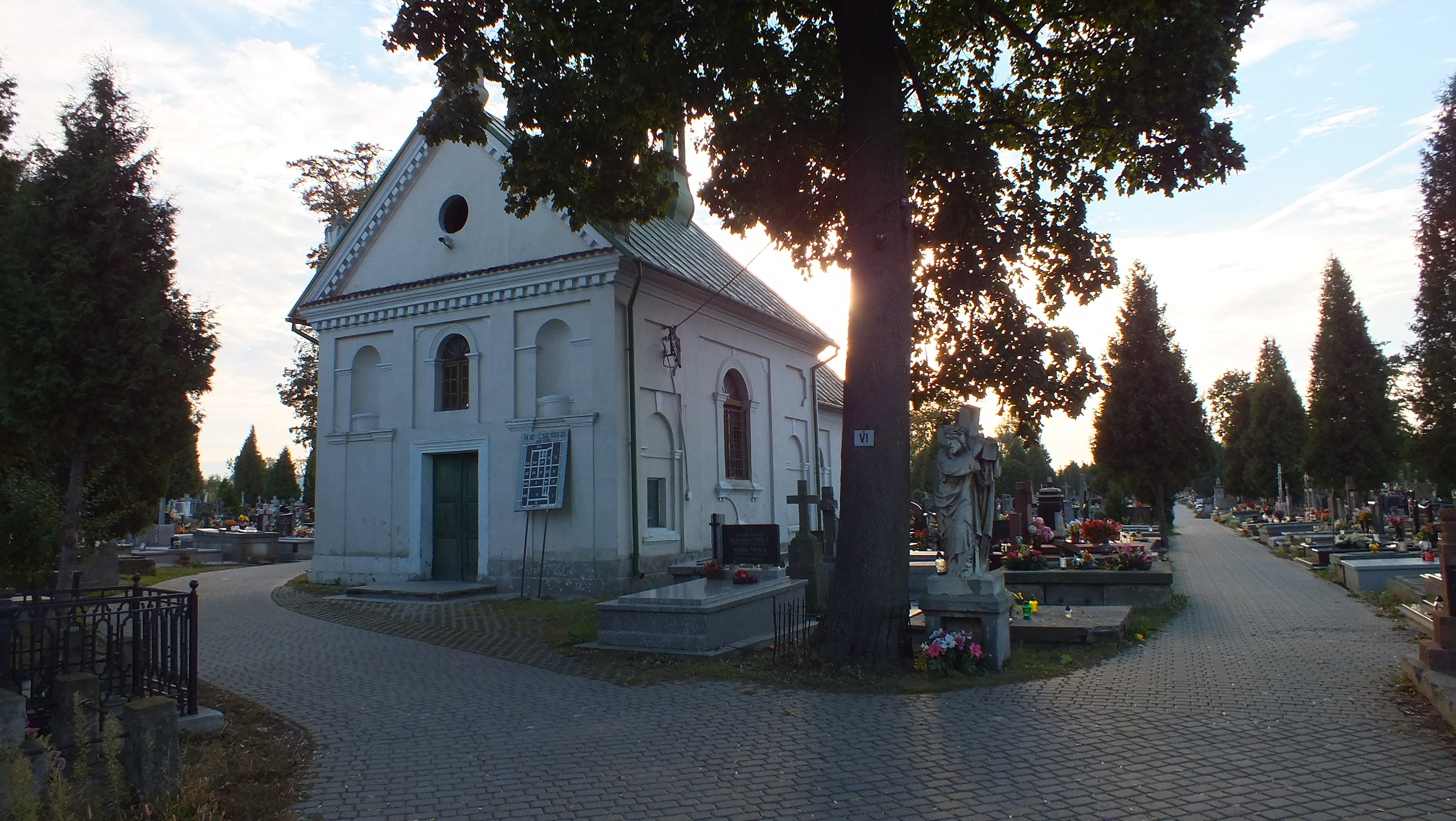 Lubartów, ul. Szaniawskiego 66 - kaplica cmentarna, 1846 (zabytek nr rejestr. A/117 z 30.11.1966)